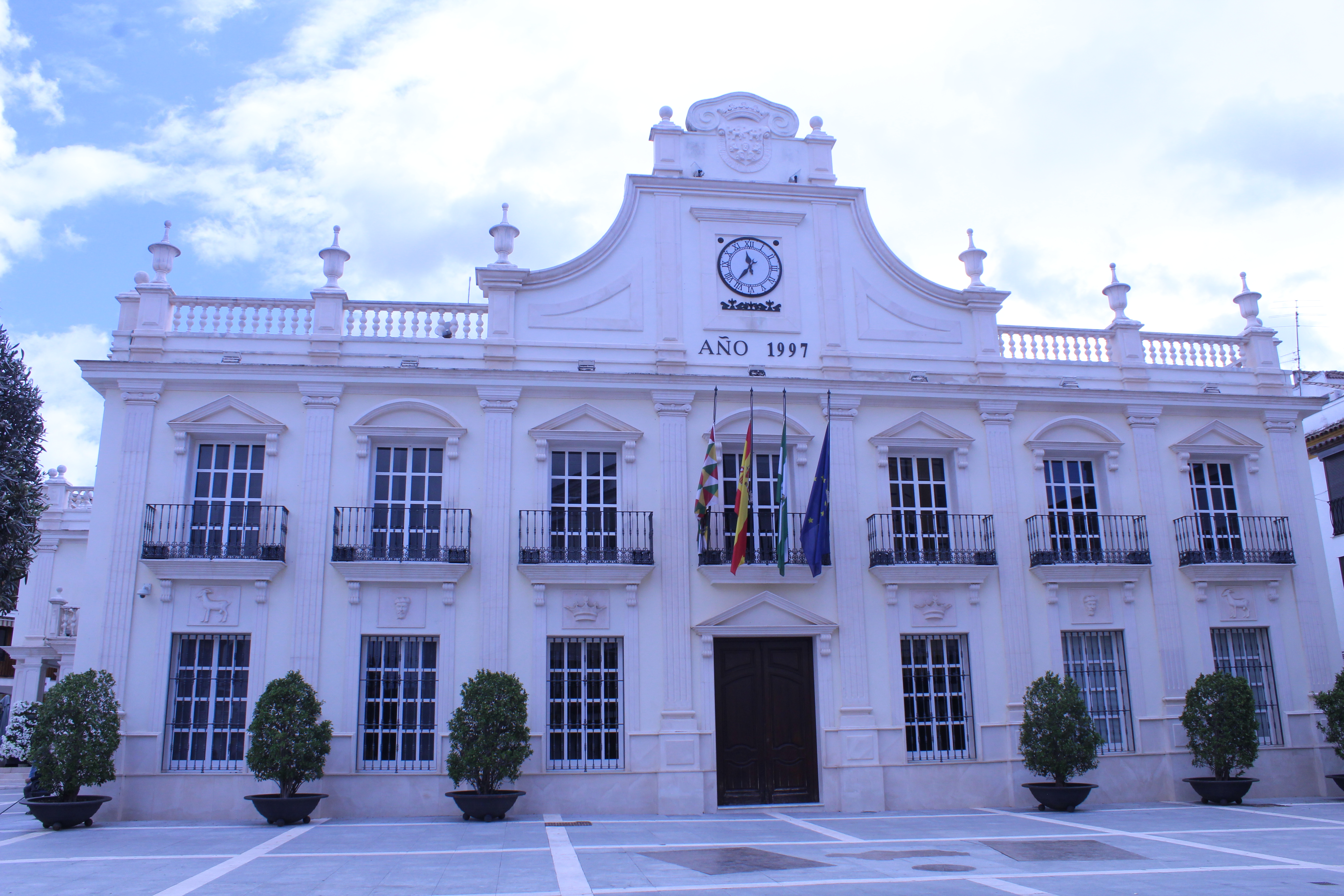 Fachada del Ayuntamiento de Cabra